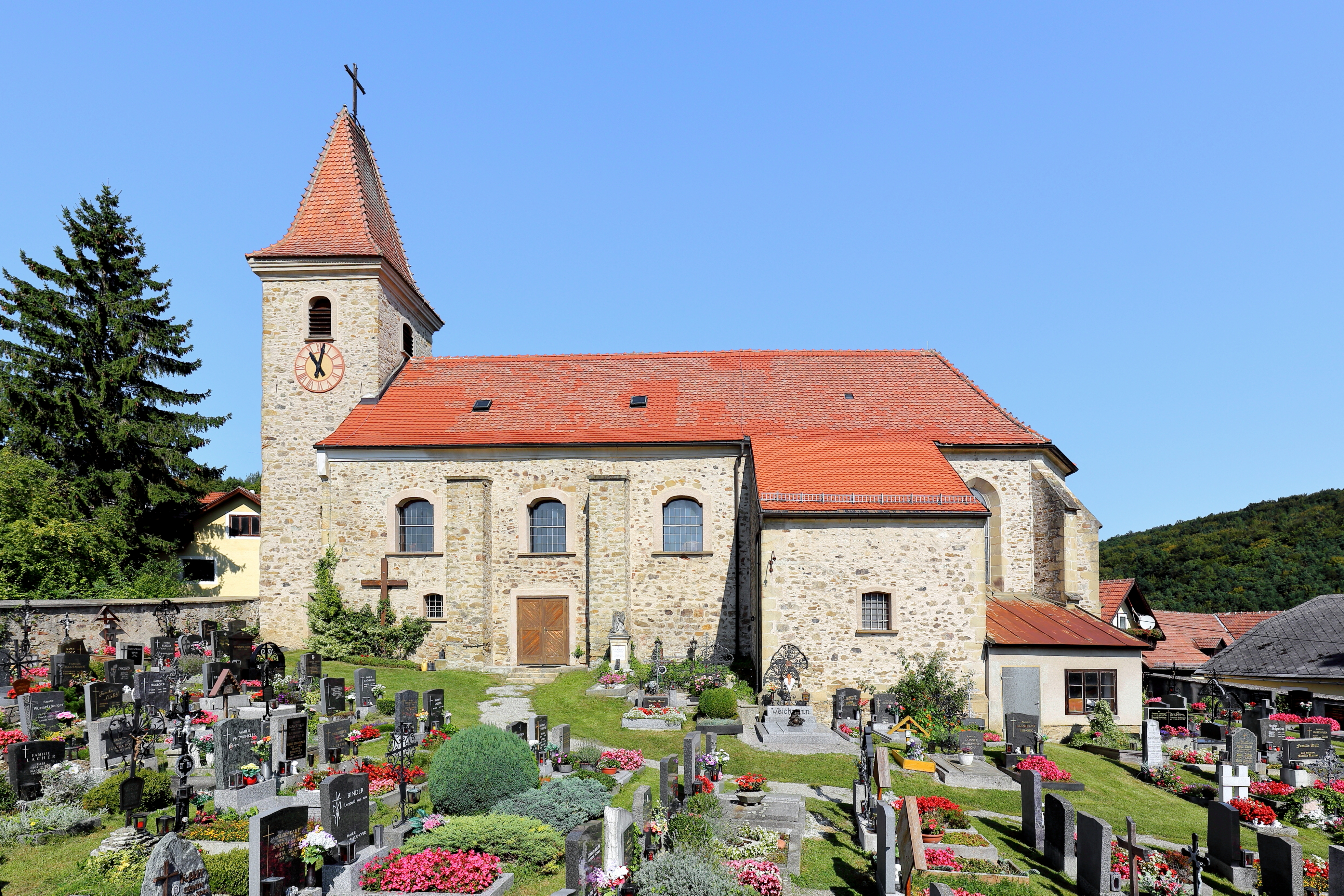 Südansicht der röm.-kath. Pfarrkirche hl. Johannes der Täufer in der niederösterreichischen Gemeinde Brand-Laaben.Der Chor mit 5/8-Schluss des steinsichtigen Sakralbaues ist gotisch und das dreijochige Langhaus barock. Der vorgestellte Westturm wurde 1708 errichtet, 1758 erhöht und hat ein Zeltdach um 1900. Die Sakristei unter Pultdach im Süden ist spätgotisch.